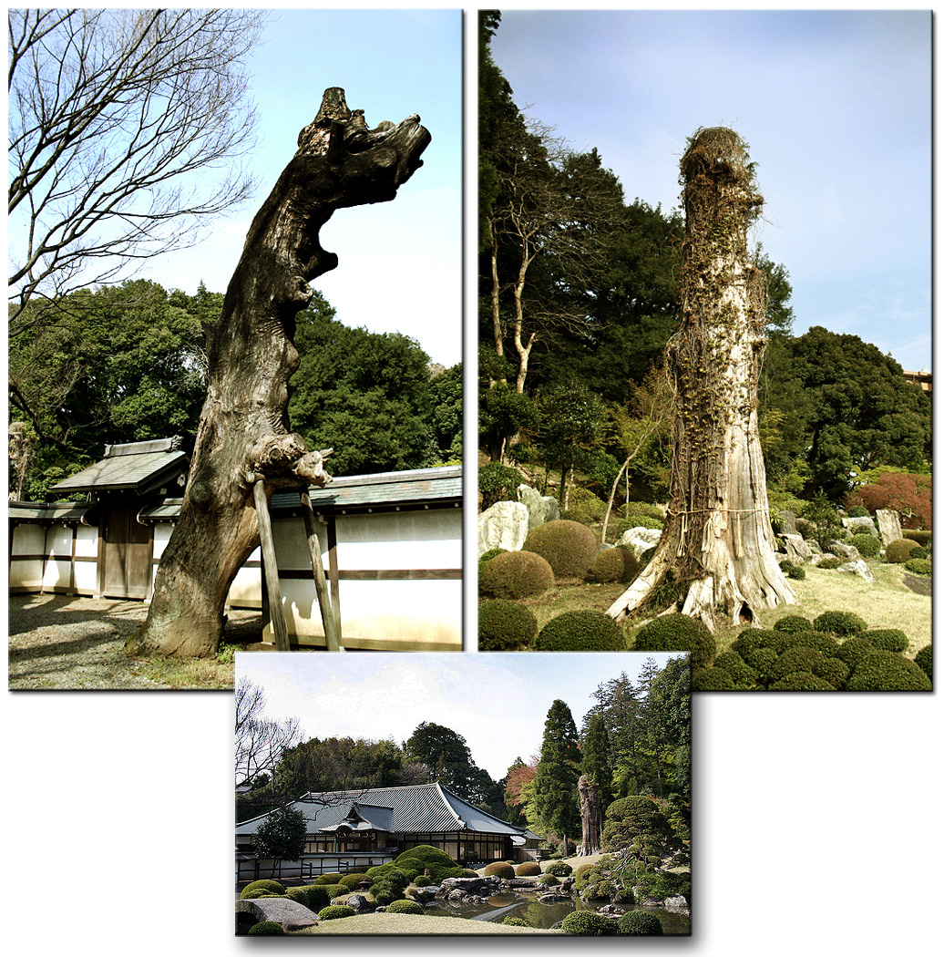 Kagoyamaen Garden MuseumJapan